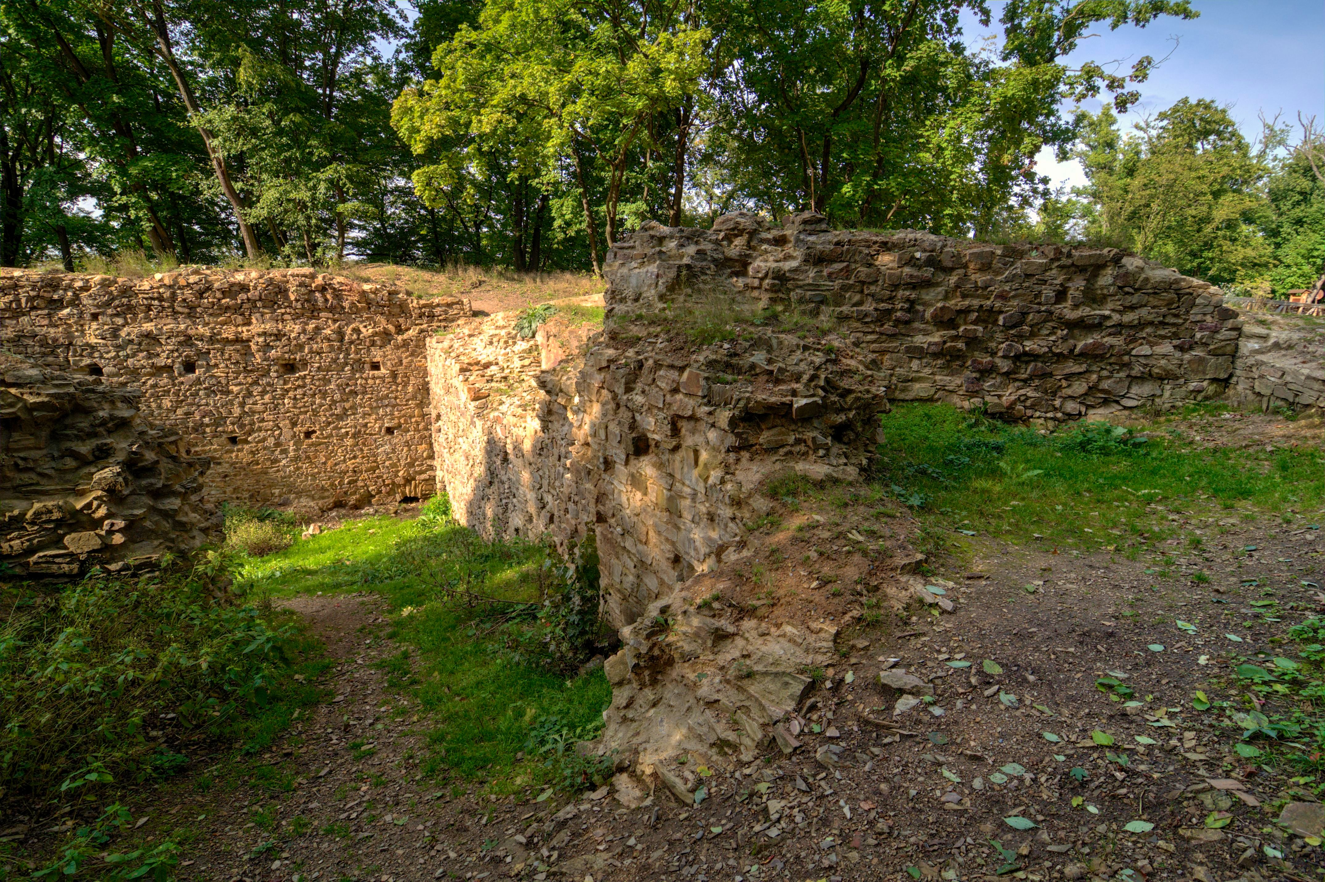 Vstup do suterénu paláce od jihu